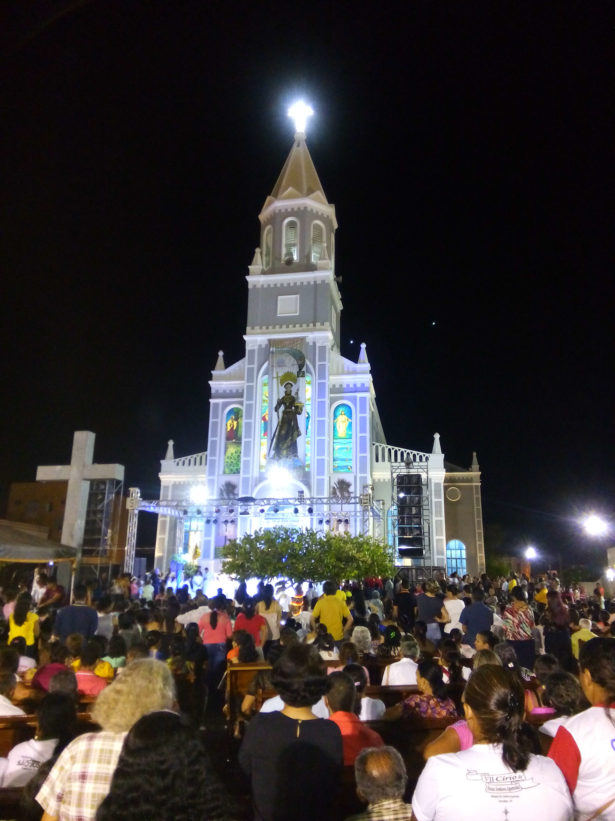 Vista da celebração pública, na praça Bona Primo, pela comemoração dos 300 anos da construção do templo católico no local.